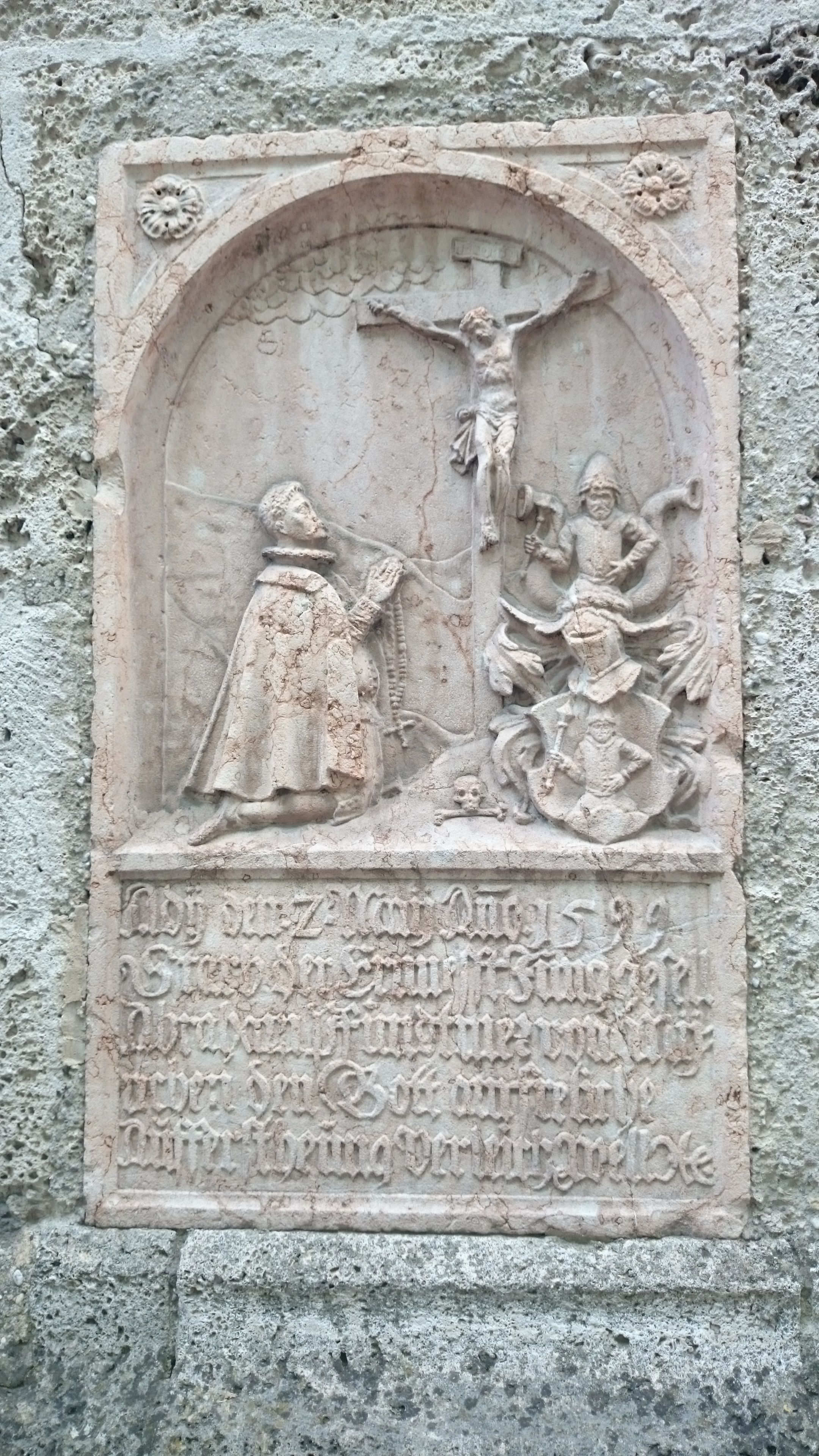 Wasserburg am Inn